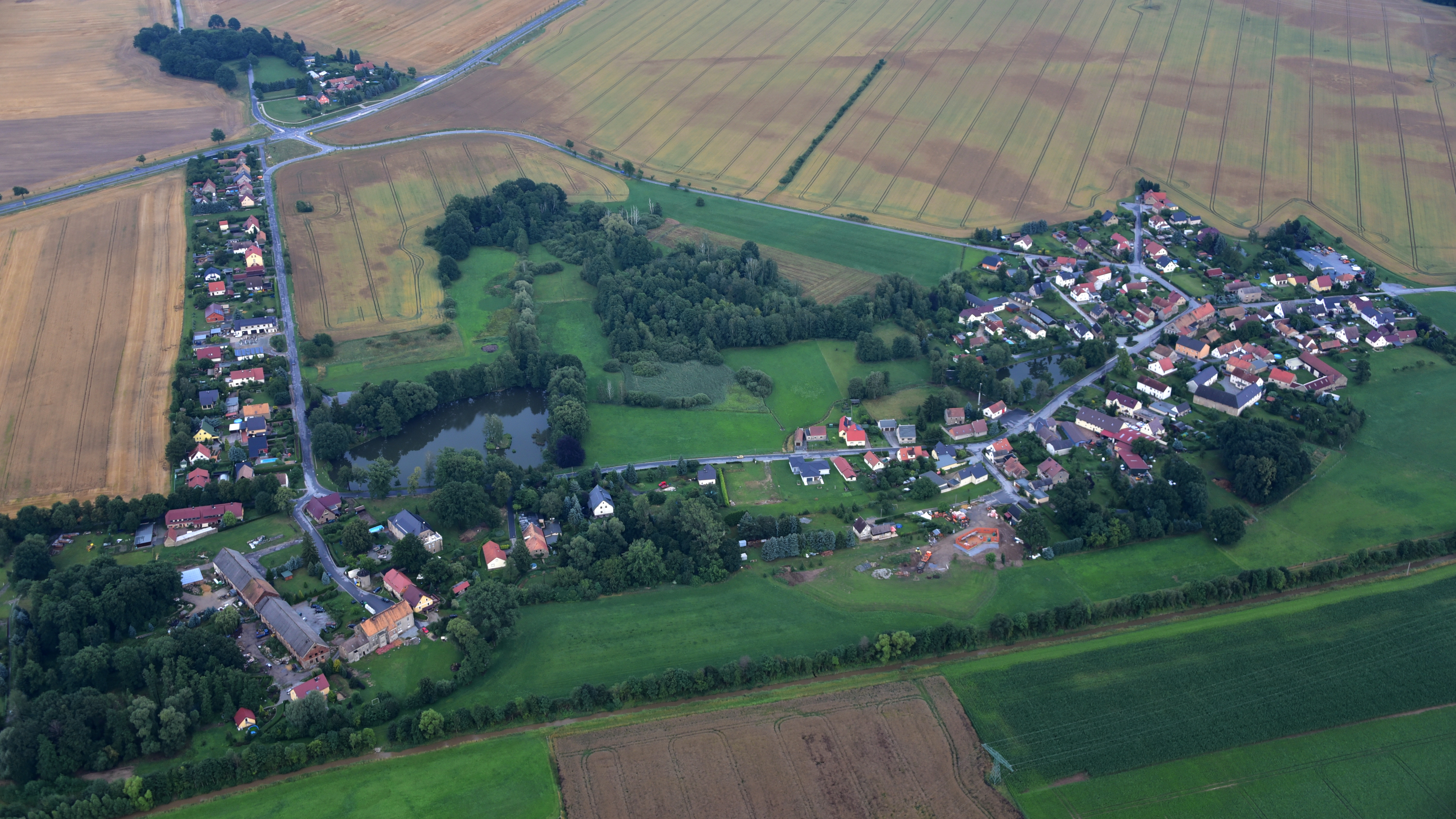 Luga (Neschwitz), Luftaufnahme (2017) Hornjoserbsce: Powětrowy wobraz Łuha (2017)